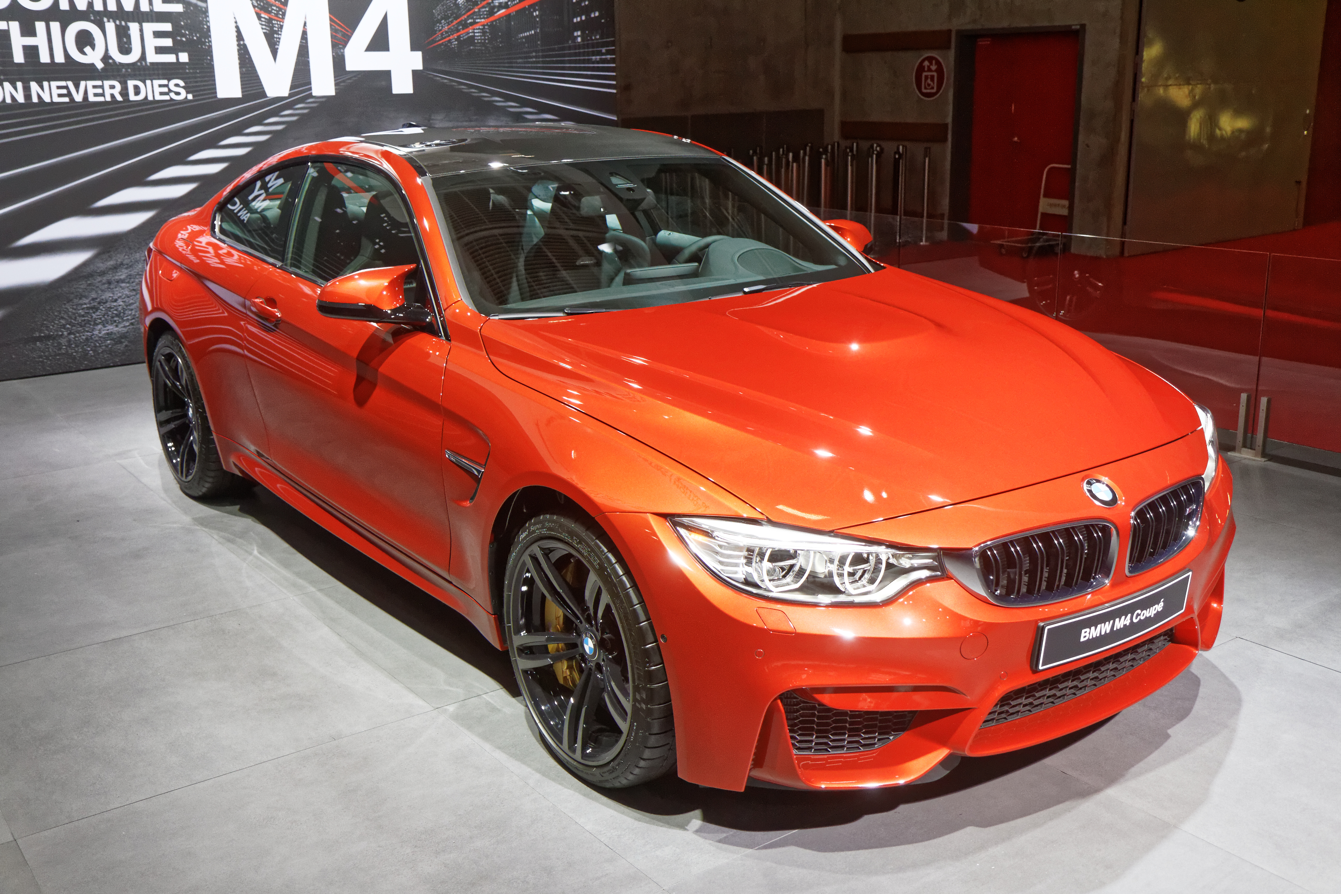 Une BMW M4 Coupé présentée lors du mondial de l'automobile de Paris 2014.